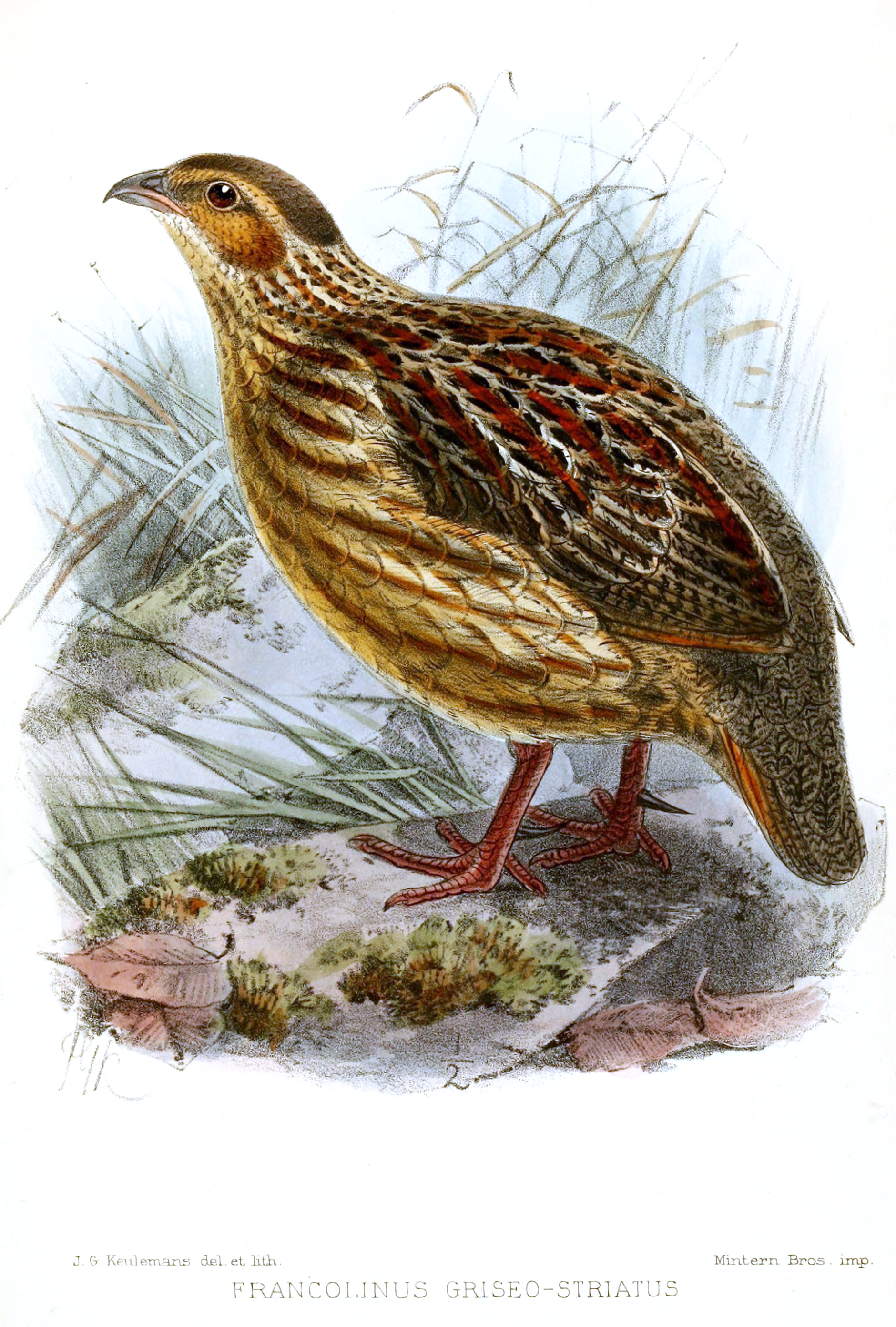 Francolinus griseostriatus